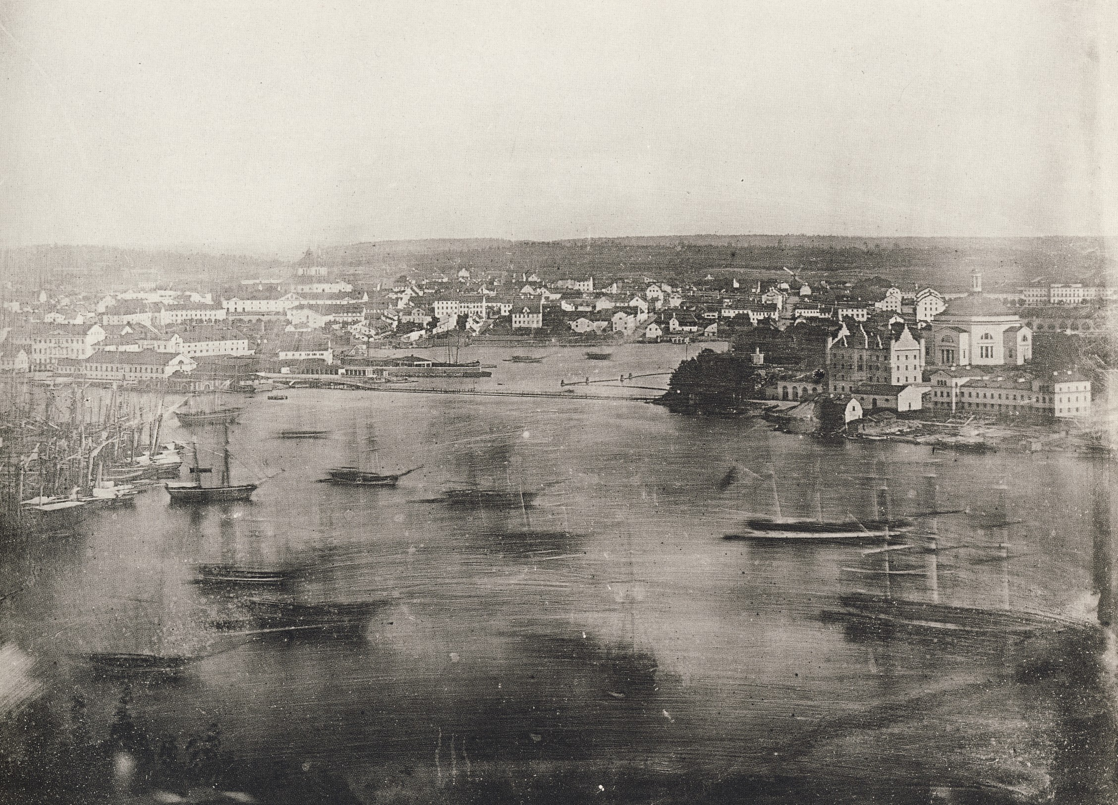 Utsikt från Mosebacke över Stockholm. Daguerreotypi – bland de äldsta kända fotografierna över Stockholm.